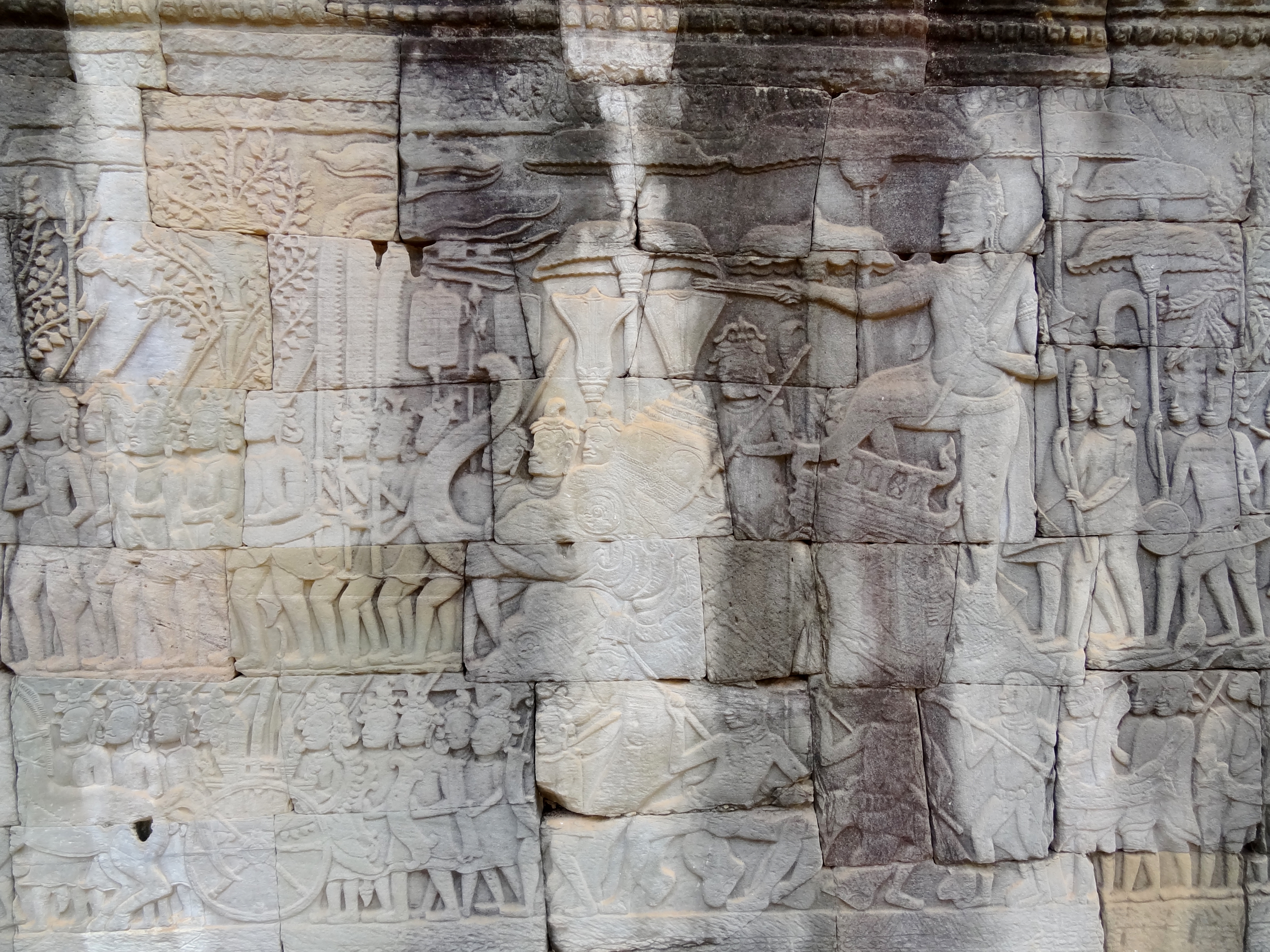 Relief des Bayon (ប្រាសាទបាយ័ន) von Angkor Thom (អង្គរធំ ‚Große Hauptstadt‘), Provinz Siem Reap, Kambodscha